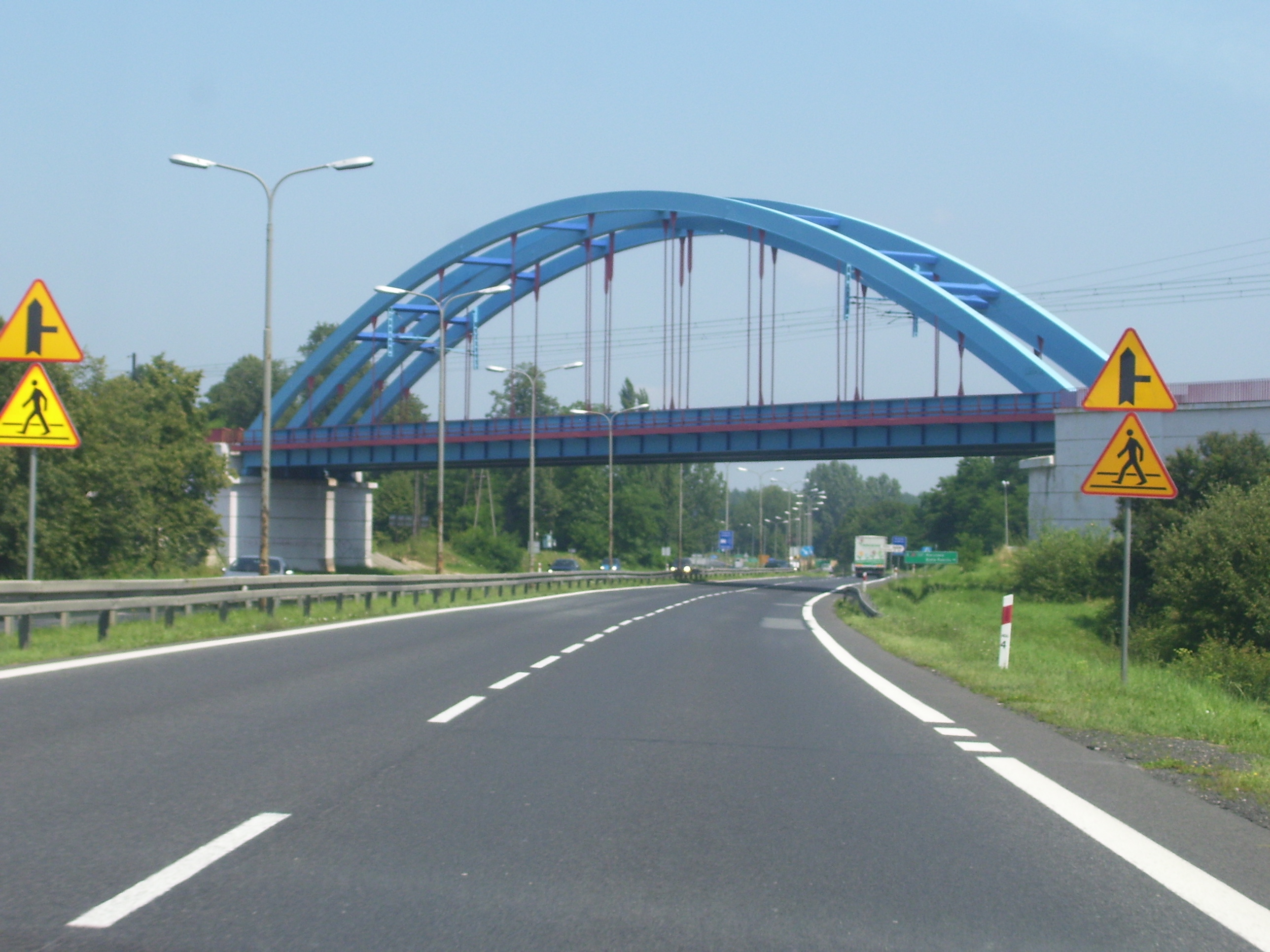 Droga krajowa nr 8 na wysokości miejscowości Huta Zawadzka. Wiaduktem przebiega Centralna Magistrala Kolejowa (linia kolejowa nr 4).